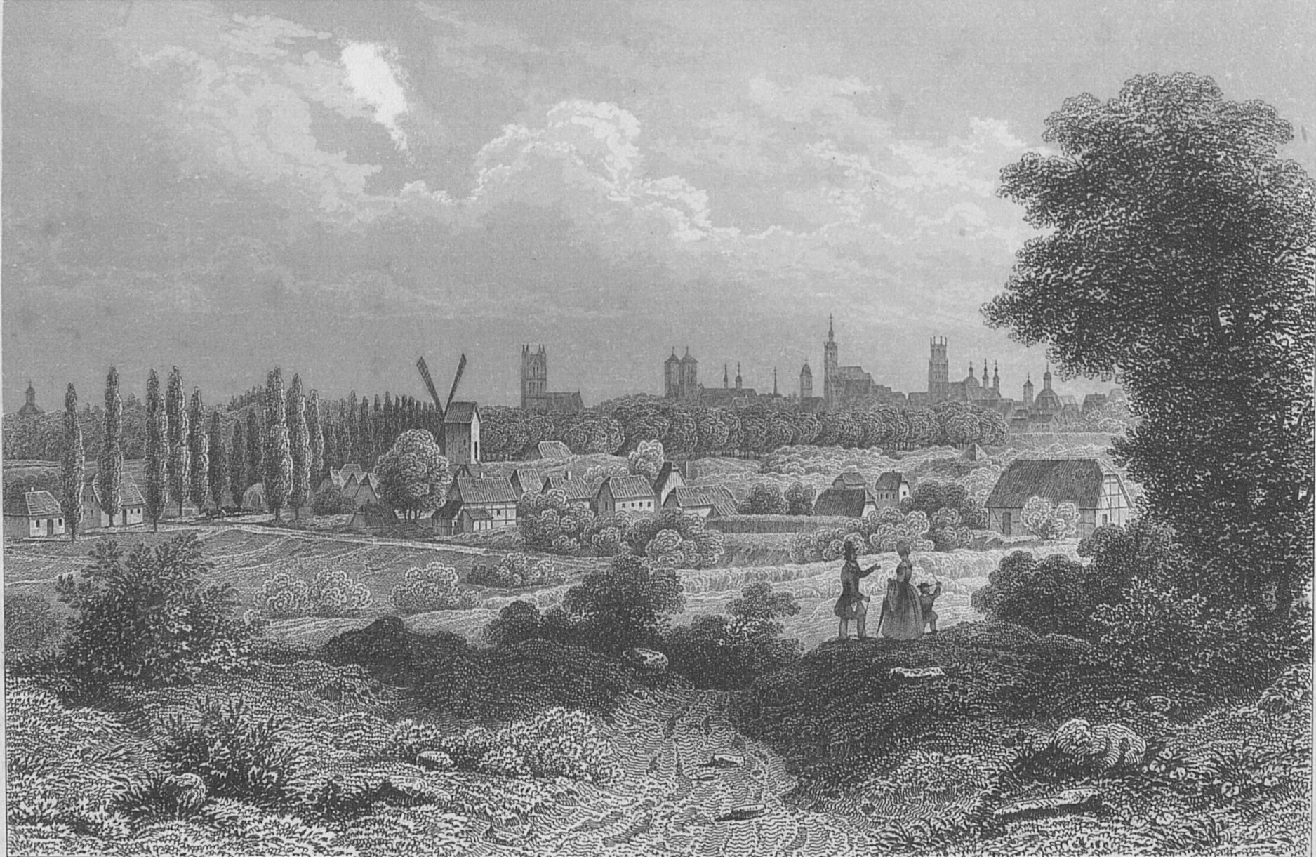 Münster von der Südseite